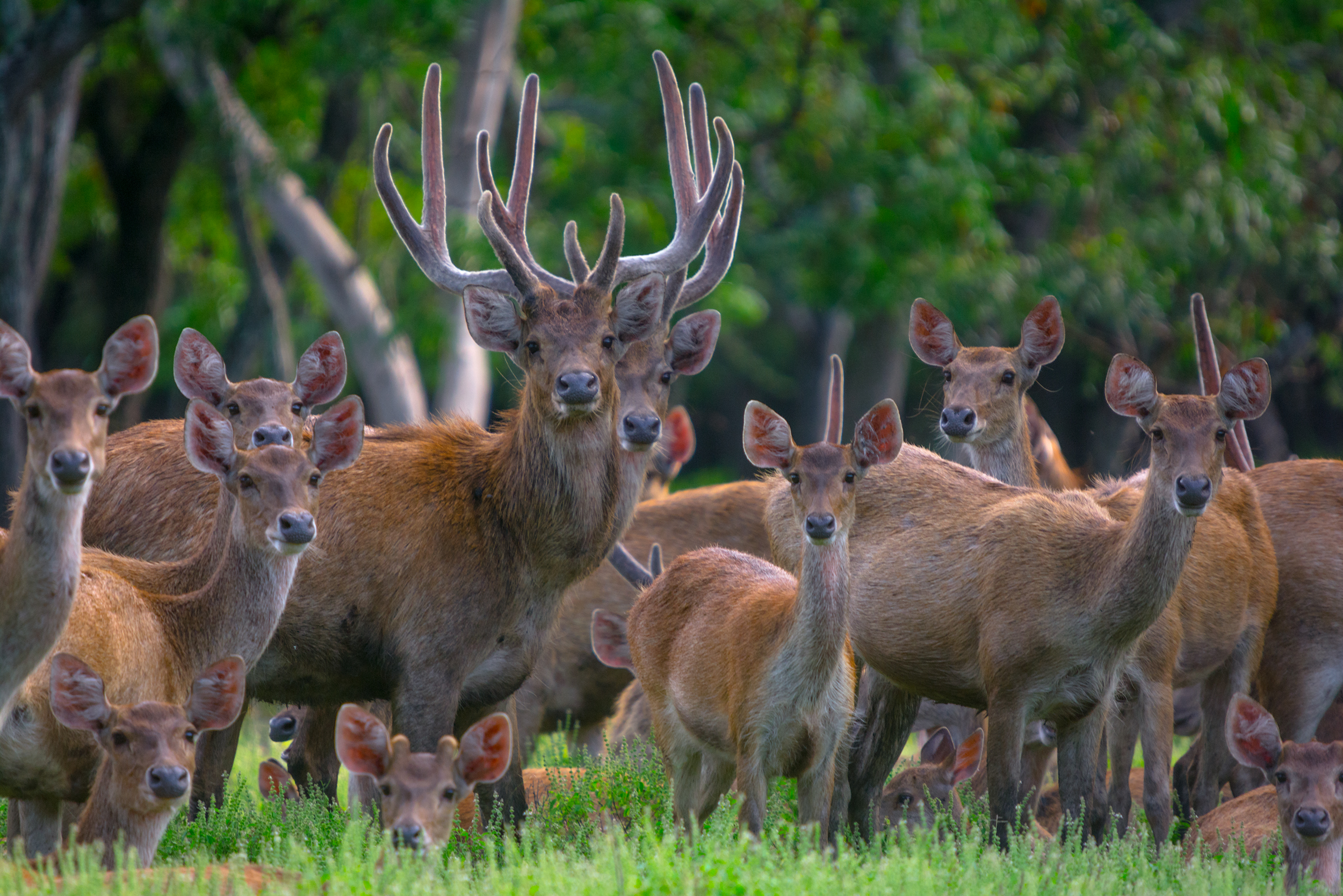 Sekawanan Rusa timor ( Cervus timorensis Russa ) sedang berkumpul saat siang hari di taman nasional baluran